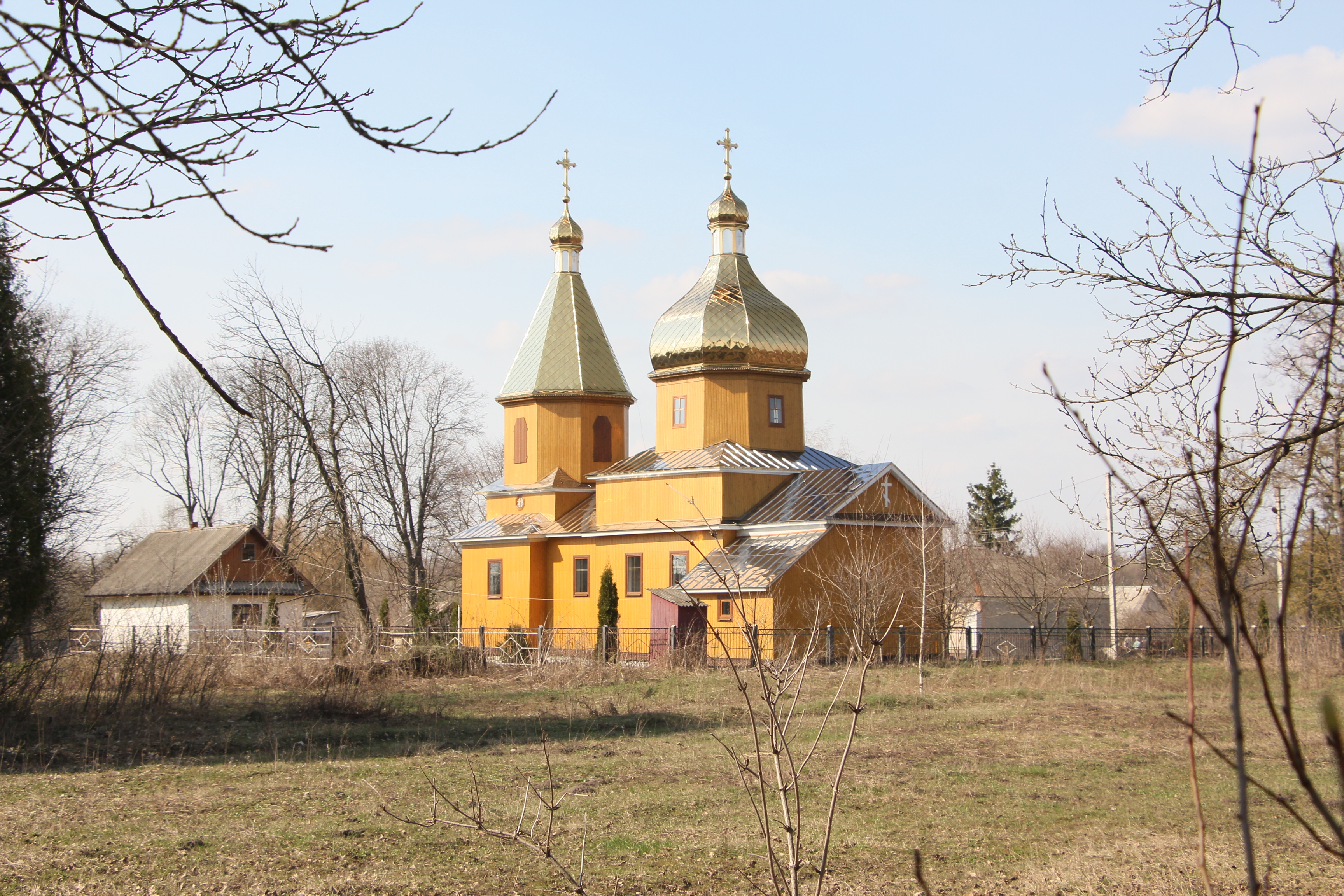 Дерев'яна церква в селі Загірці Лановецького району, Тернопільської області